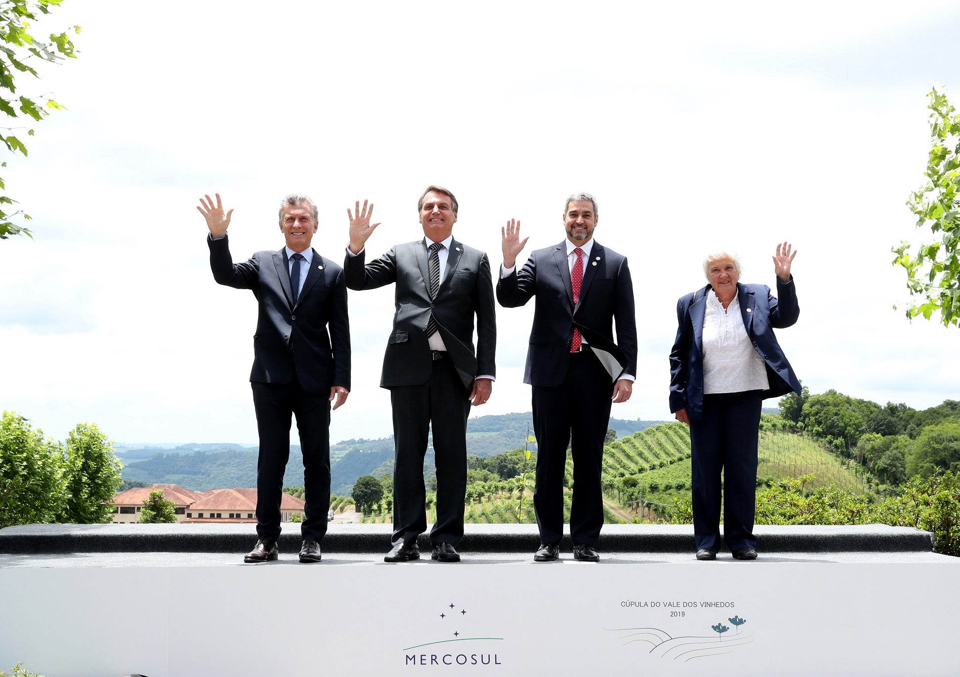 El presidente Macri expuso ante la Cumbre de Jefes de Estado del Mercosur durante el encuentro realizado en la localidad turística de Bento Goncalves, en el sur de Brasil, de la que participó junto al mandatario local, Jair Bolsonaro, el presidente de Paraguay, Mario Abdo, y la vicepresidente de Uruguay, Lucía Topolansky.